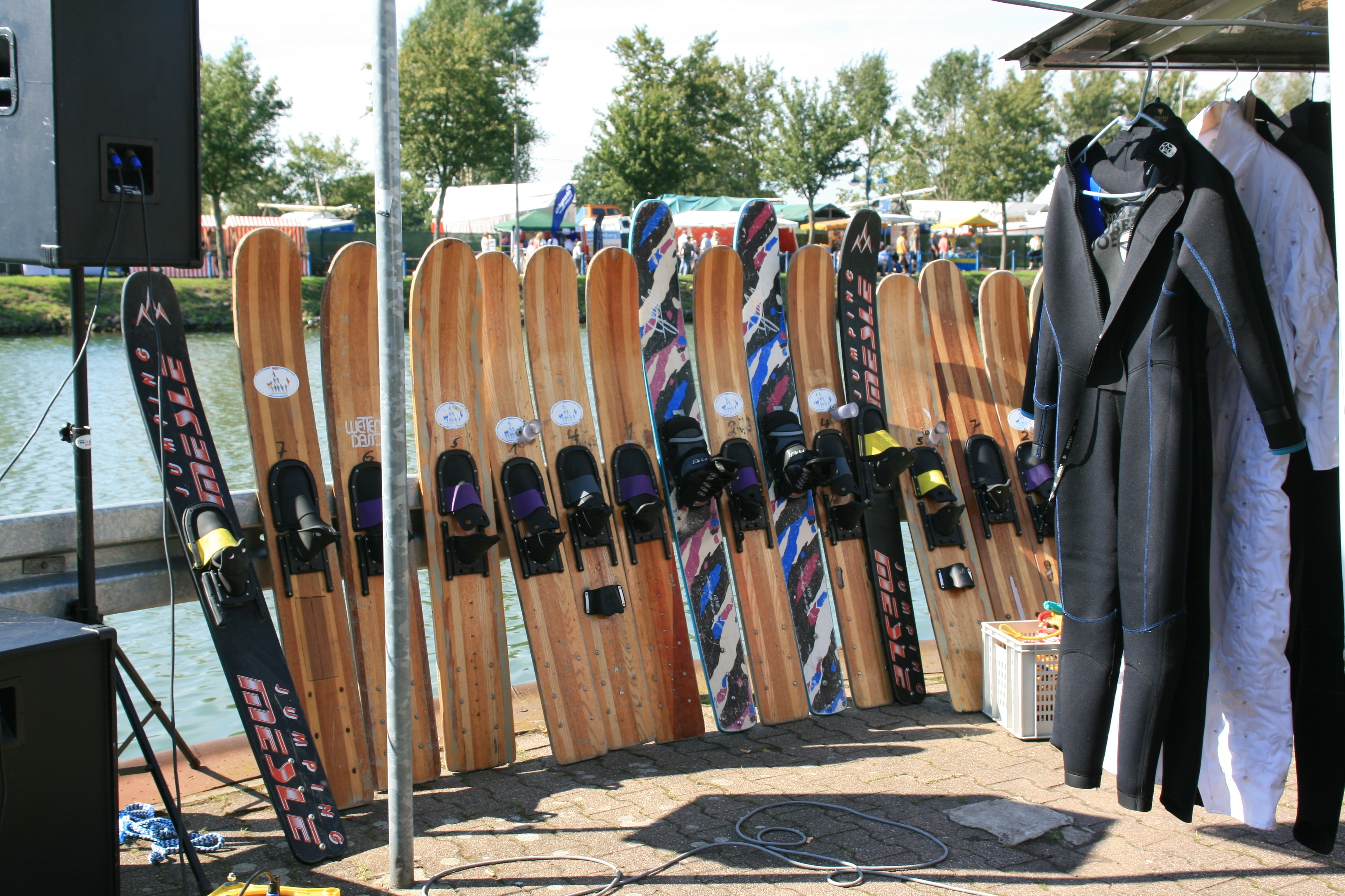 Ostufer des Dortmund-Ems-Kanals beim Kanalfestival in Datteln